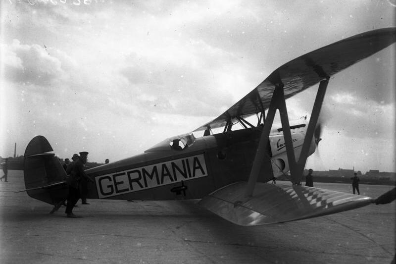 Zwischenlandung des Ozeanfliegers Könnecke in Berlin vor seinem grossen Flug über den Ozean mit der Casparmaschine "Germania".